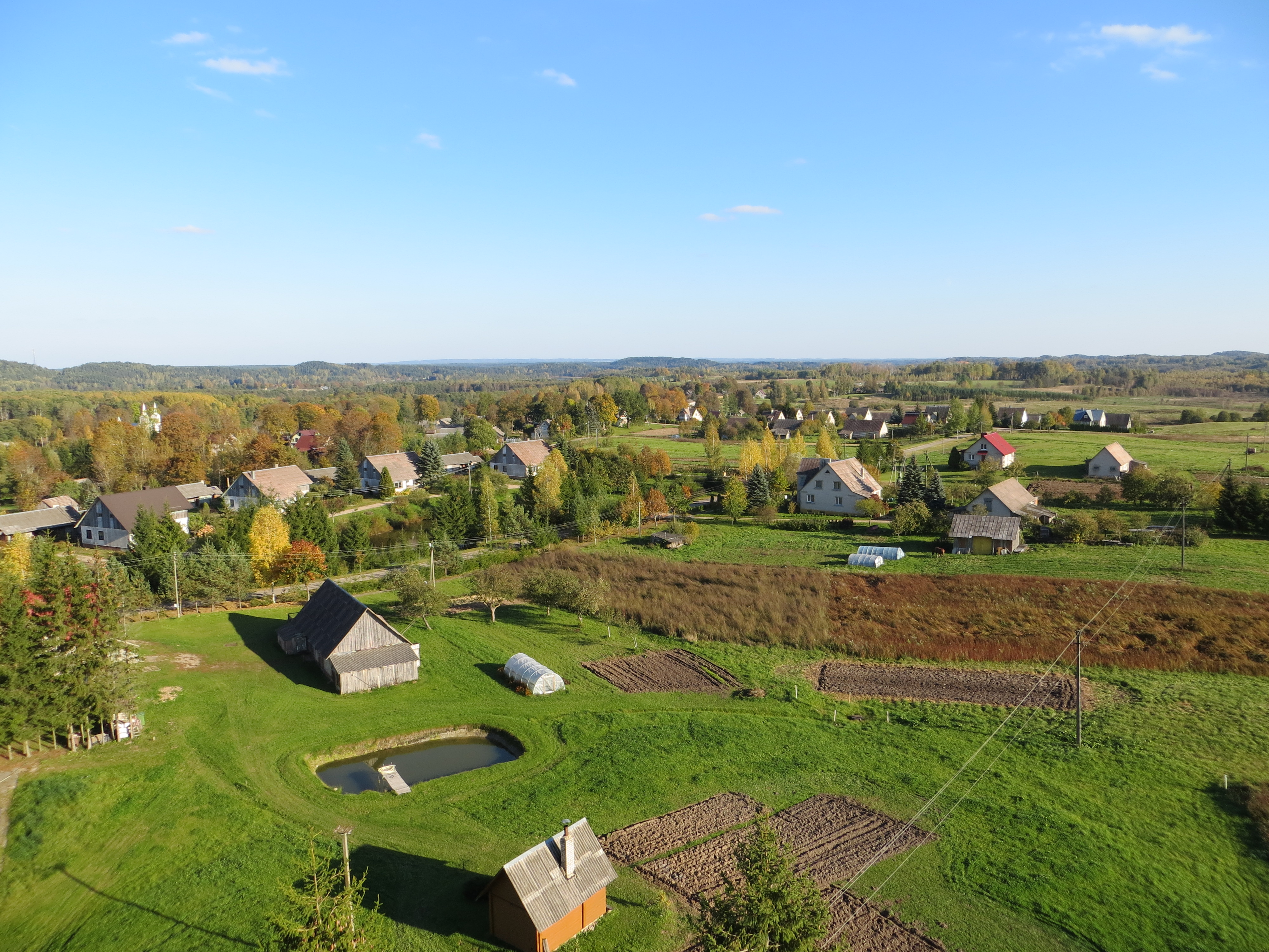 Kirdeikiai, Lithuania